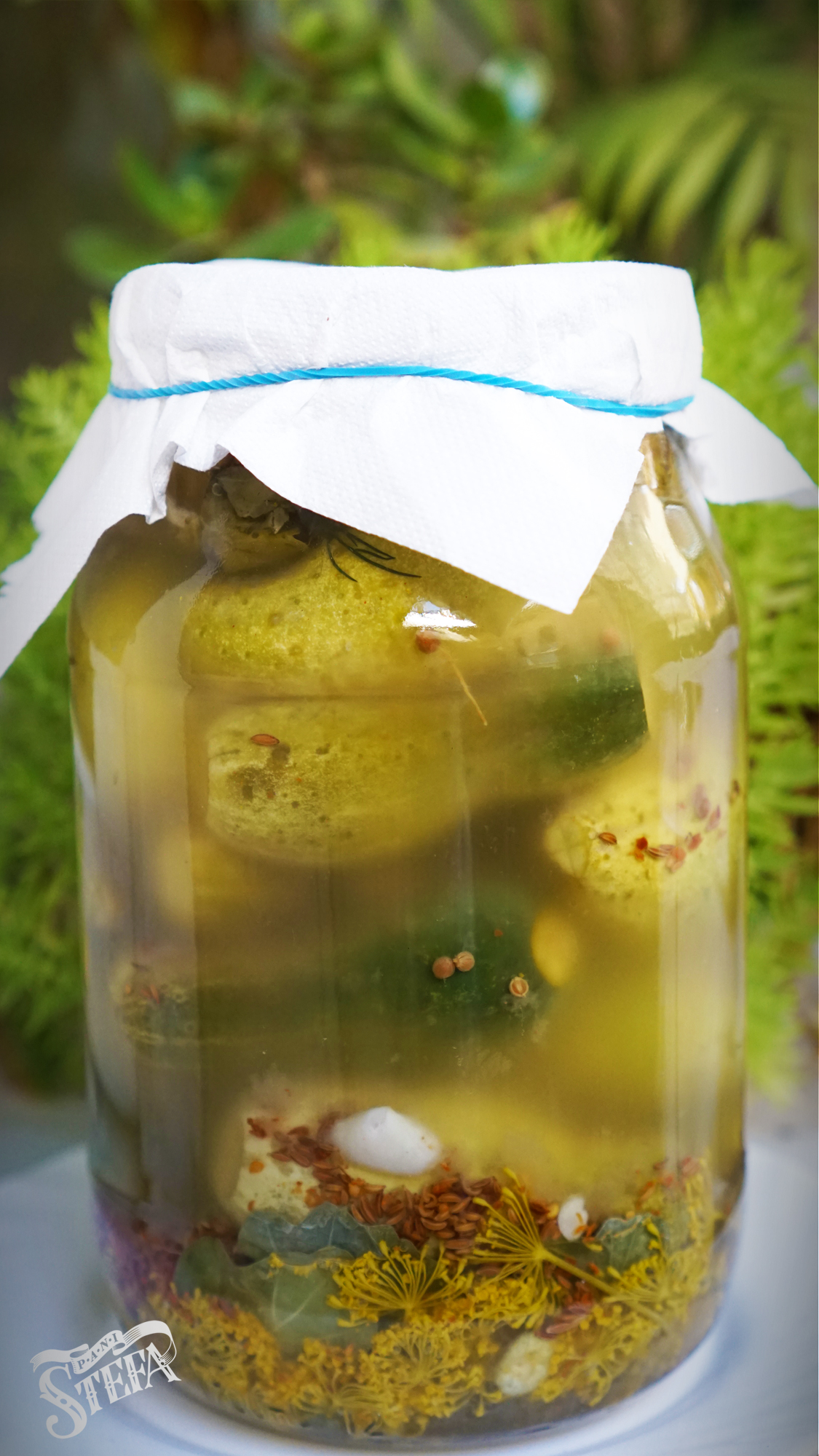 Малосольні огірки